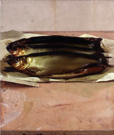 Painting